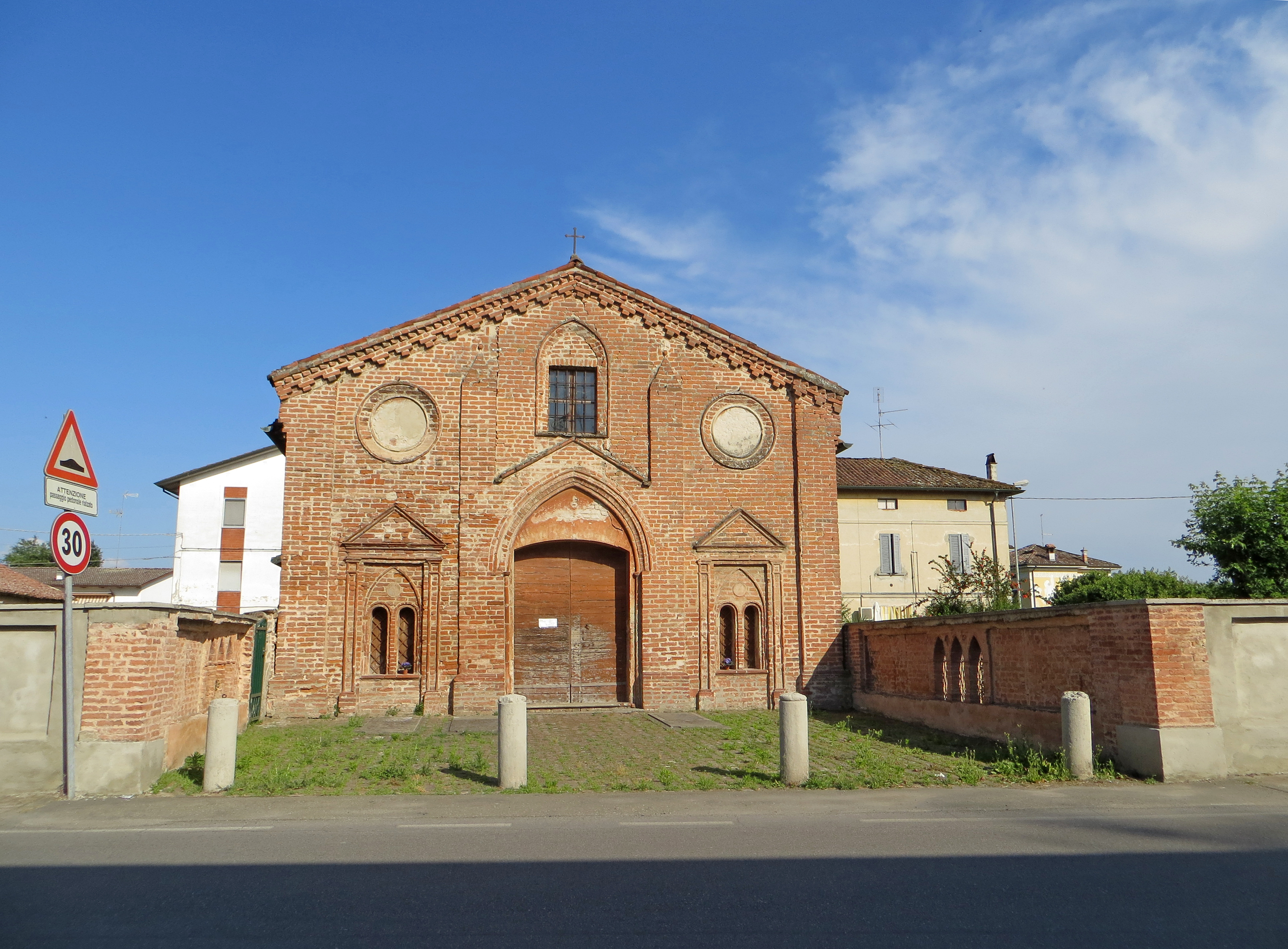 Chiesetta della Beata Vergine delle Grazie (Zibello) - facciata